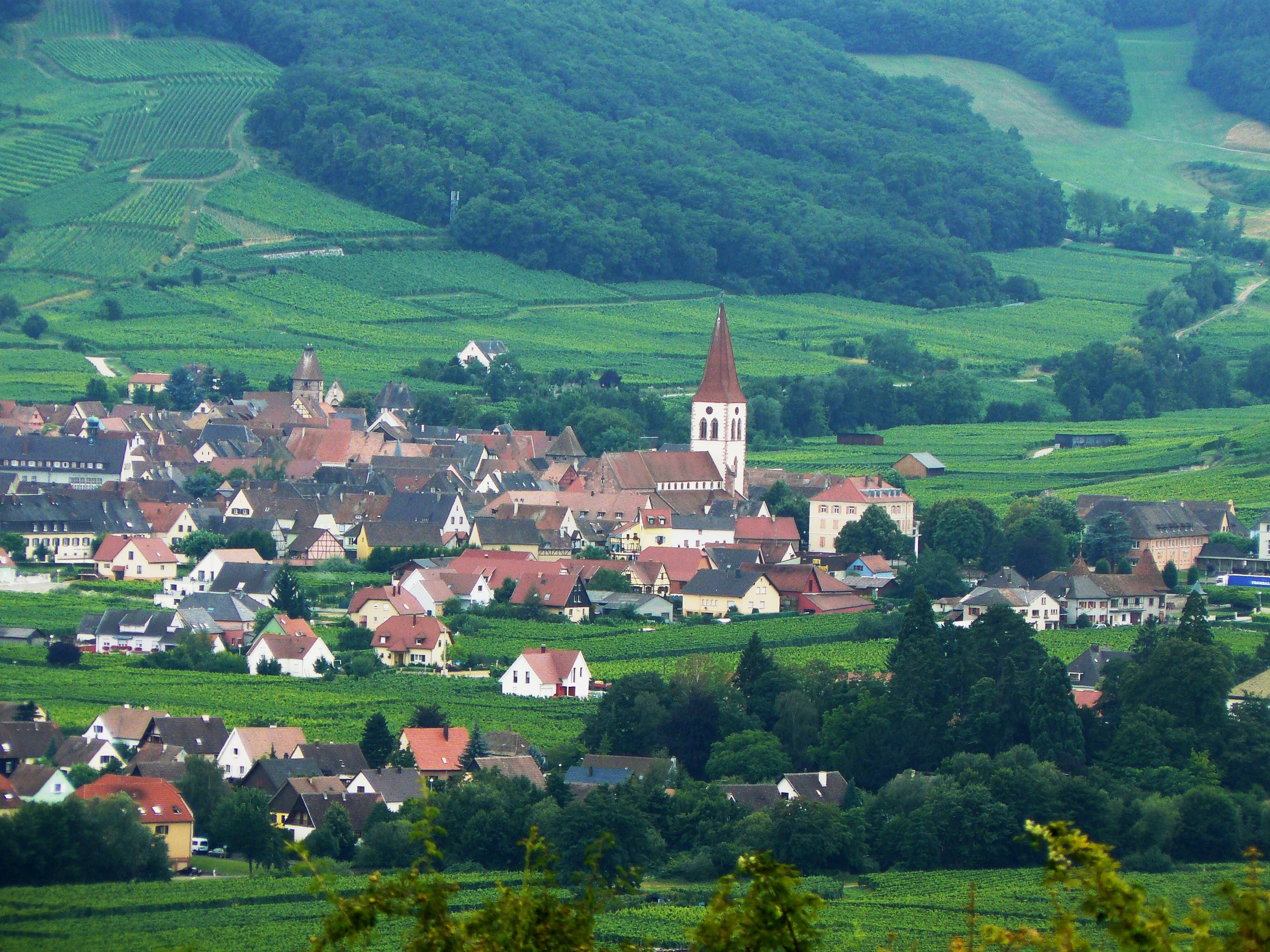 Vue sur le village d'Ammerschwihr depuis les hauteurs de Sigolsheim